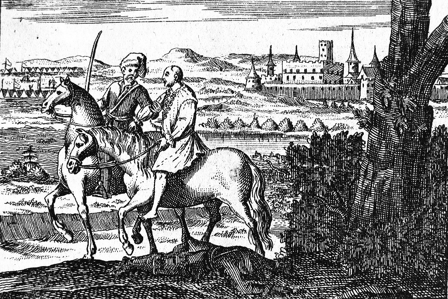 Battle of Jibou/Zsibó (1705). "Siben 1705: Der Marquis de Bellegarde wird verhaftet". Bildformat 55 x 82 mm auf einem Blatt (180 x 115 mm) mit beschreibendem Text unter dem Titel "Ungarische Geschichten"